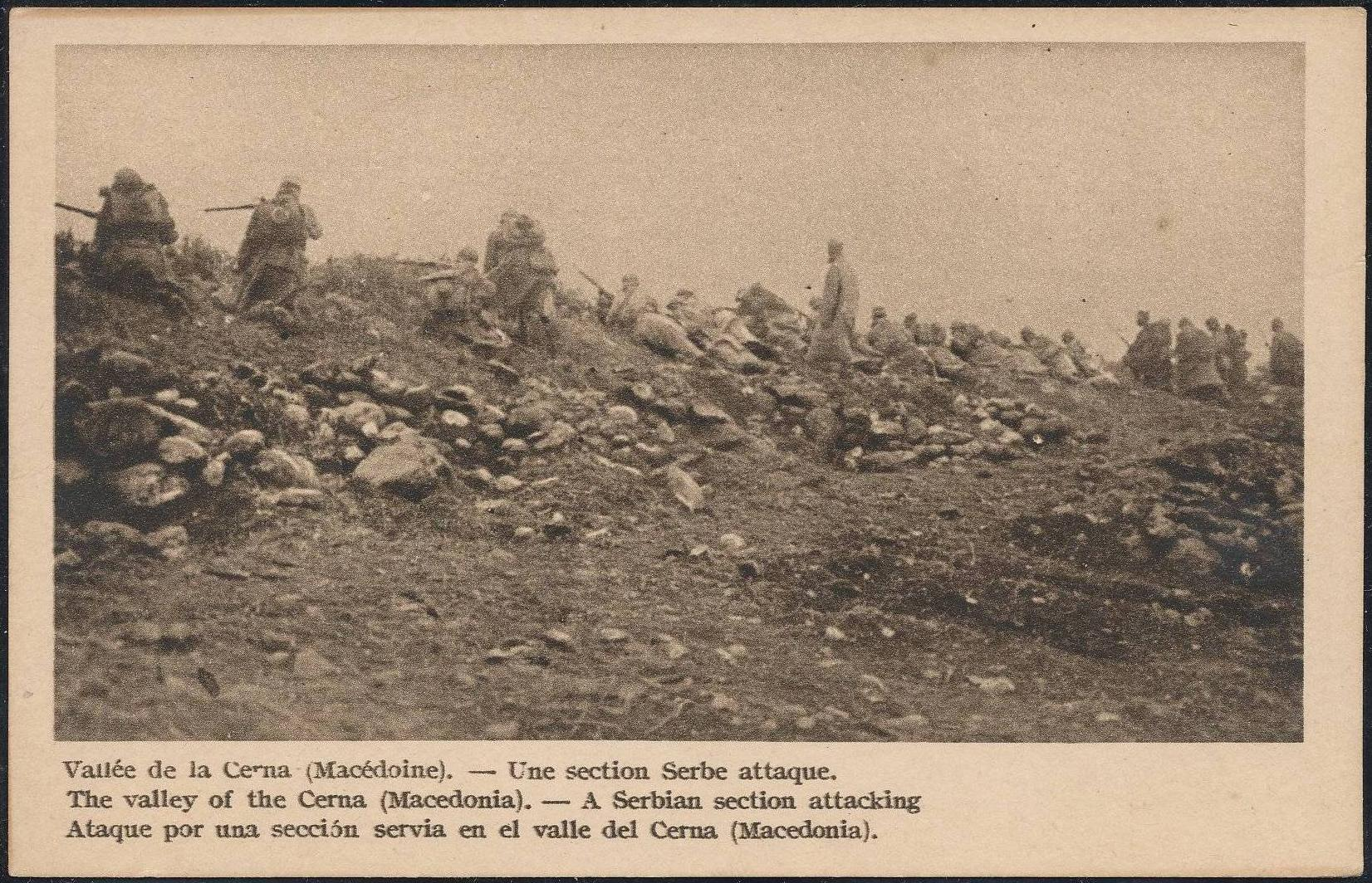 Сръбски части на Черна